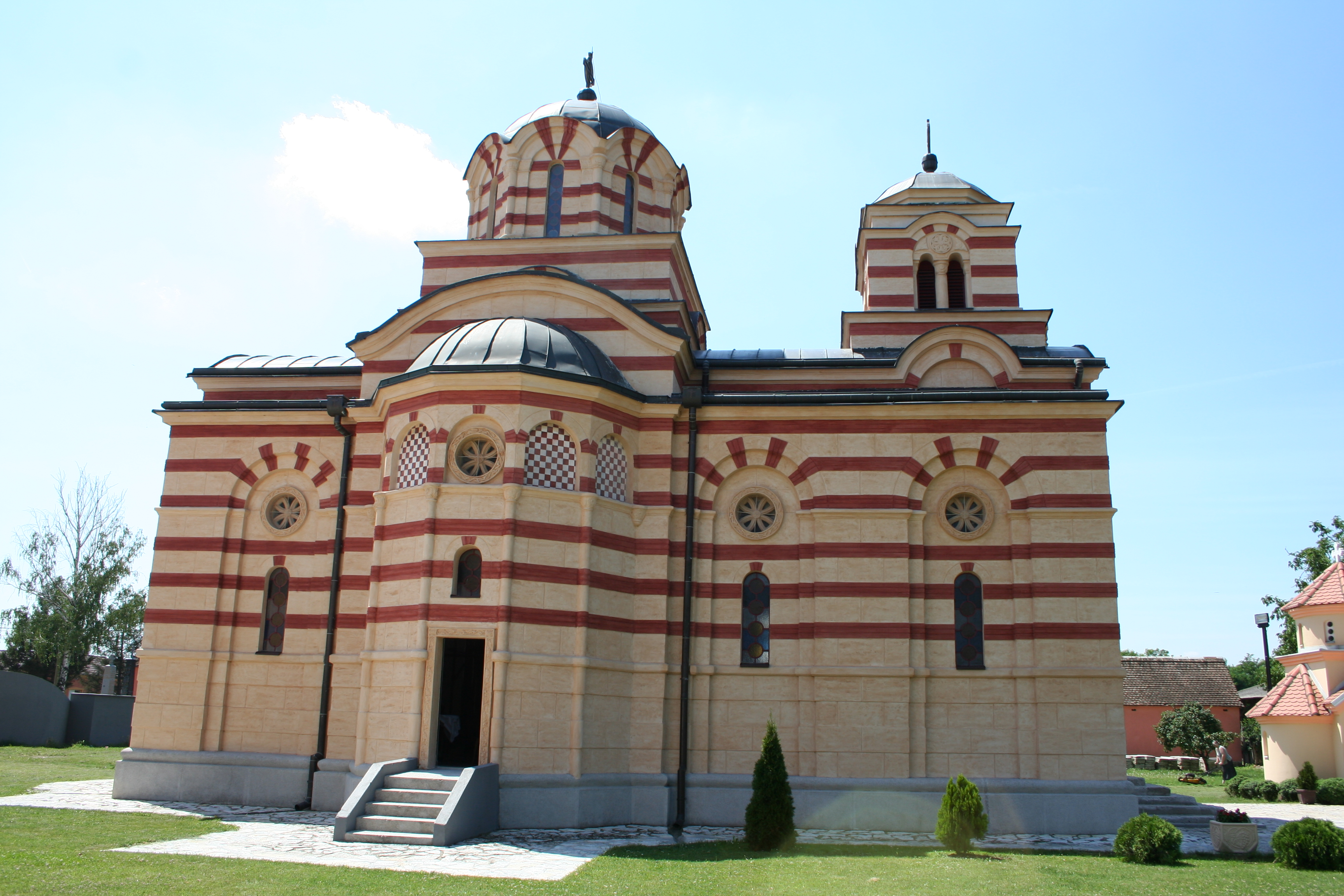 Crkva-spomen kosturnica Vaznesenja Gospodnjeg, Dublje